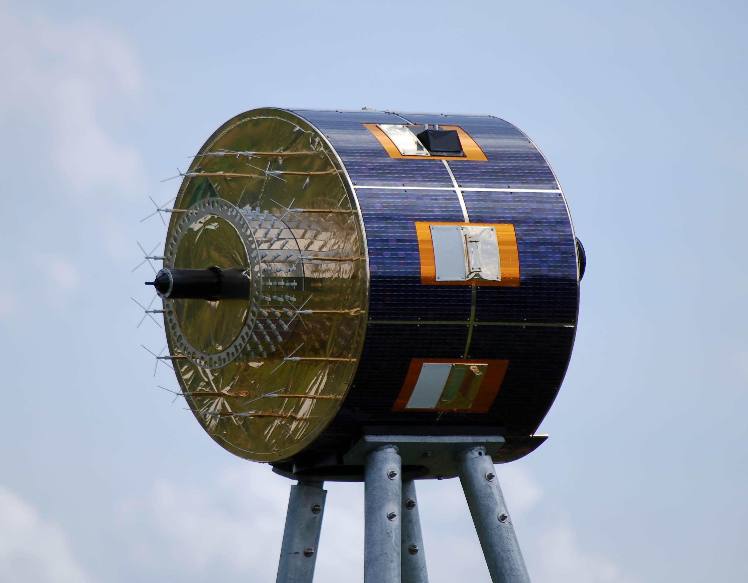 Wetterpark Offenbach, Modell des Wettersatelliten Meteosat 9.